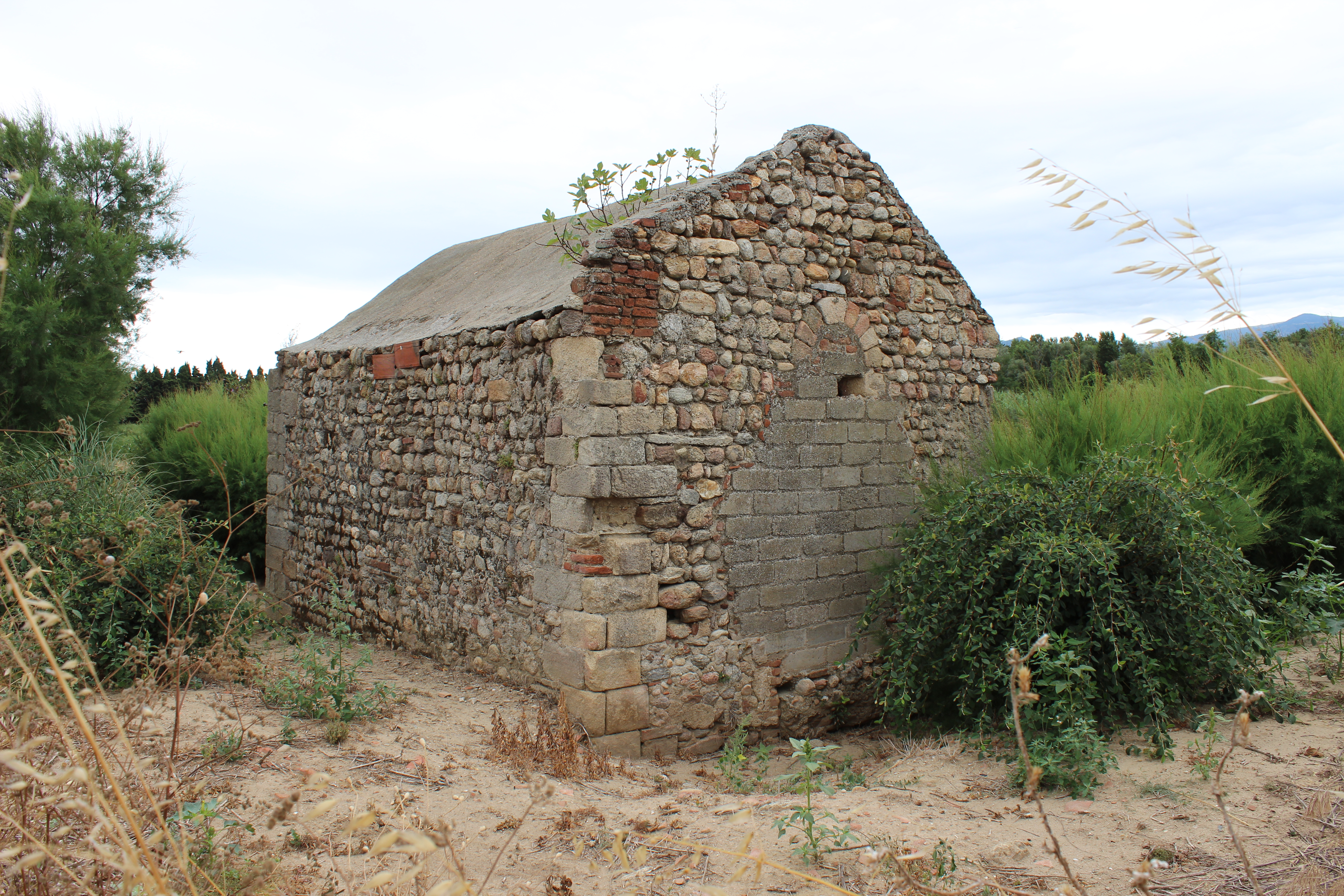 Église Sainte-Eugénie de Tresmals vue du nord-ouest